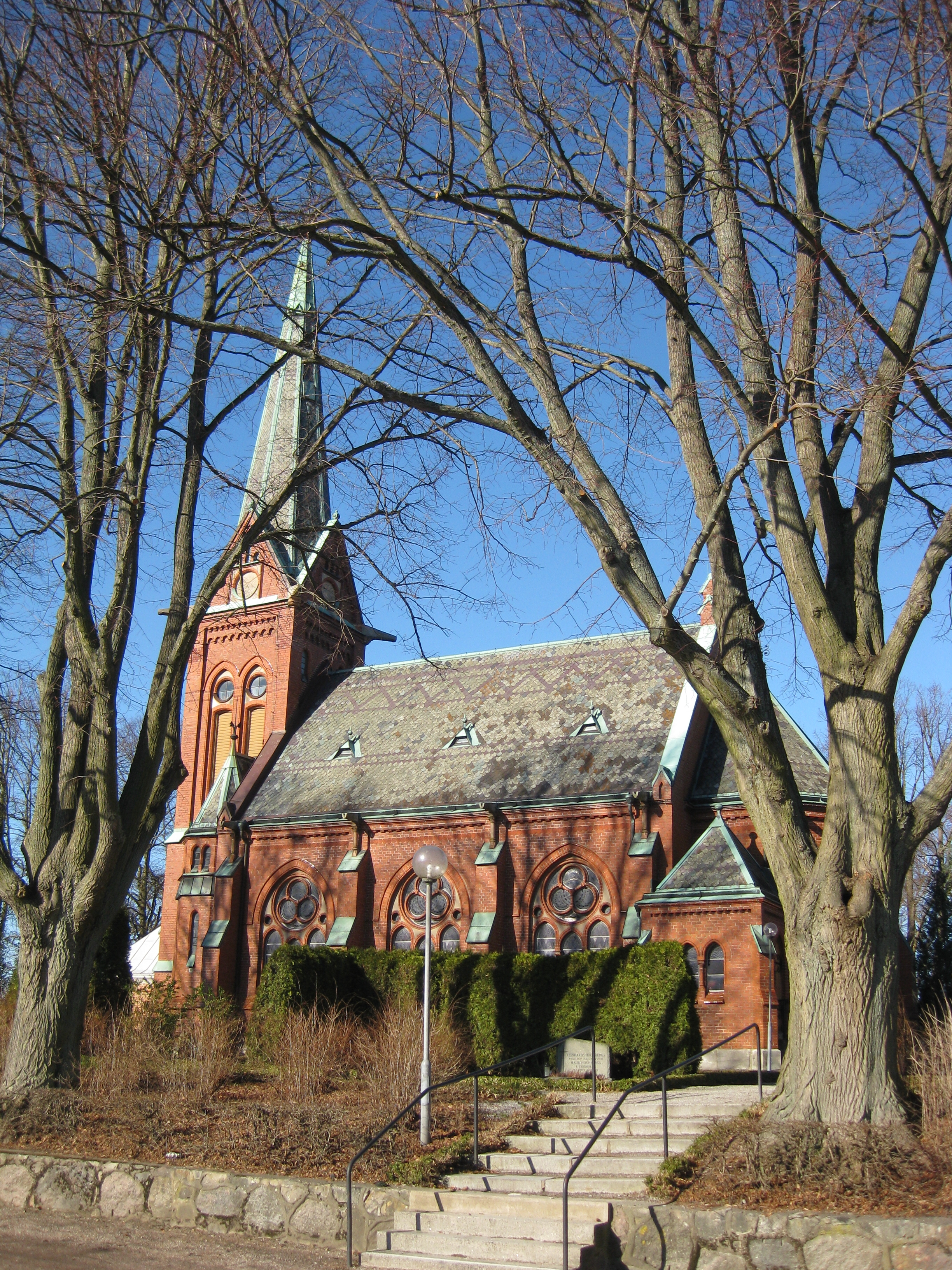 Norra Nöbbelövs kyrka i Skåne